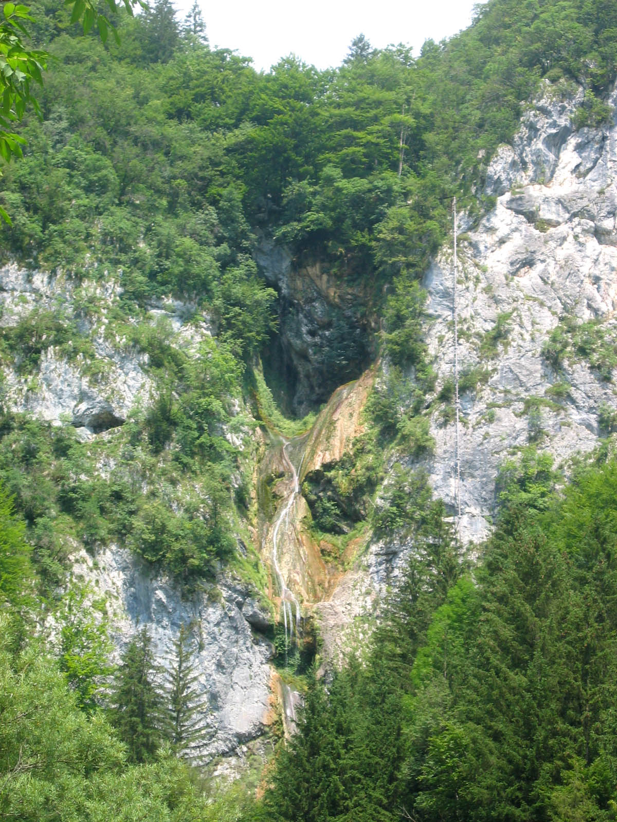 Peračica (or Pirašica) waterfall near Bohinj, Slovenia (dry period)